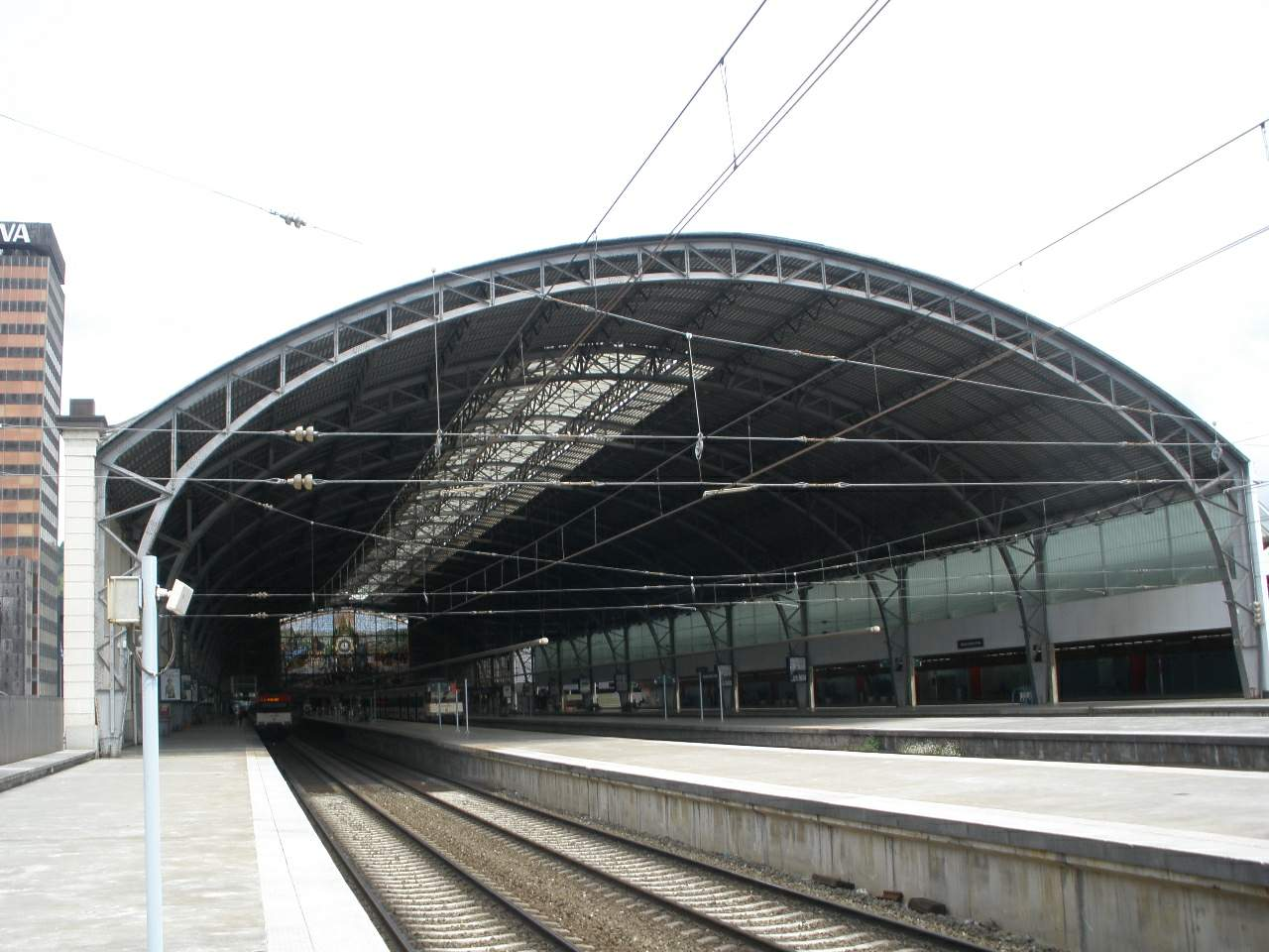 Estación de Abando Indalecio Prieto (Bilbao)